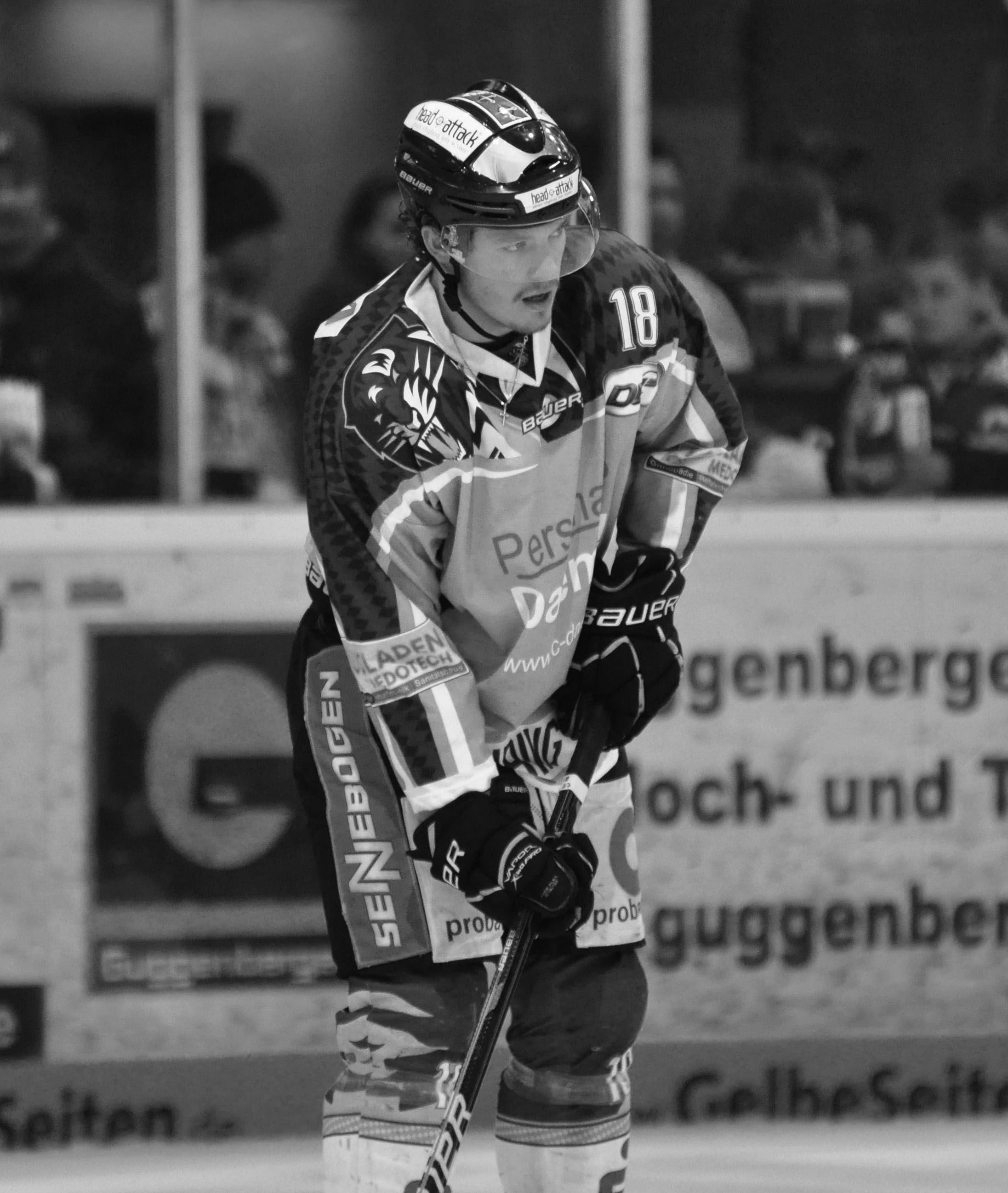 Straubing Tigers - Eisbären Berlin 07.04.2012 DEL PlayOff Halbfinale